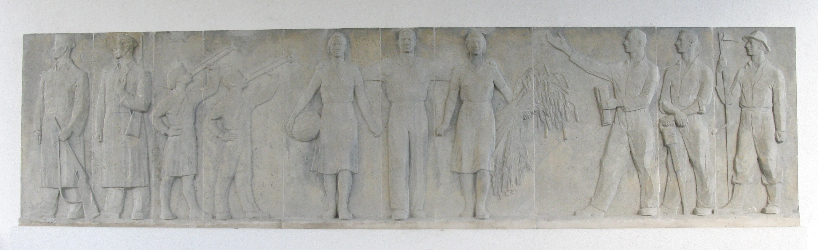 Relief Sowjetsoldaten beschützen den Aufbau der DDR